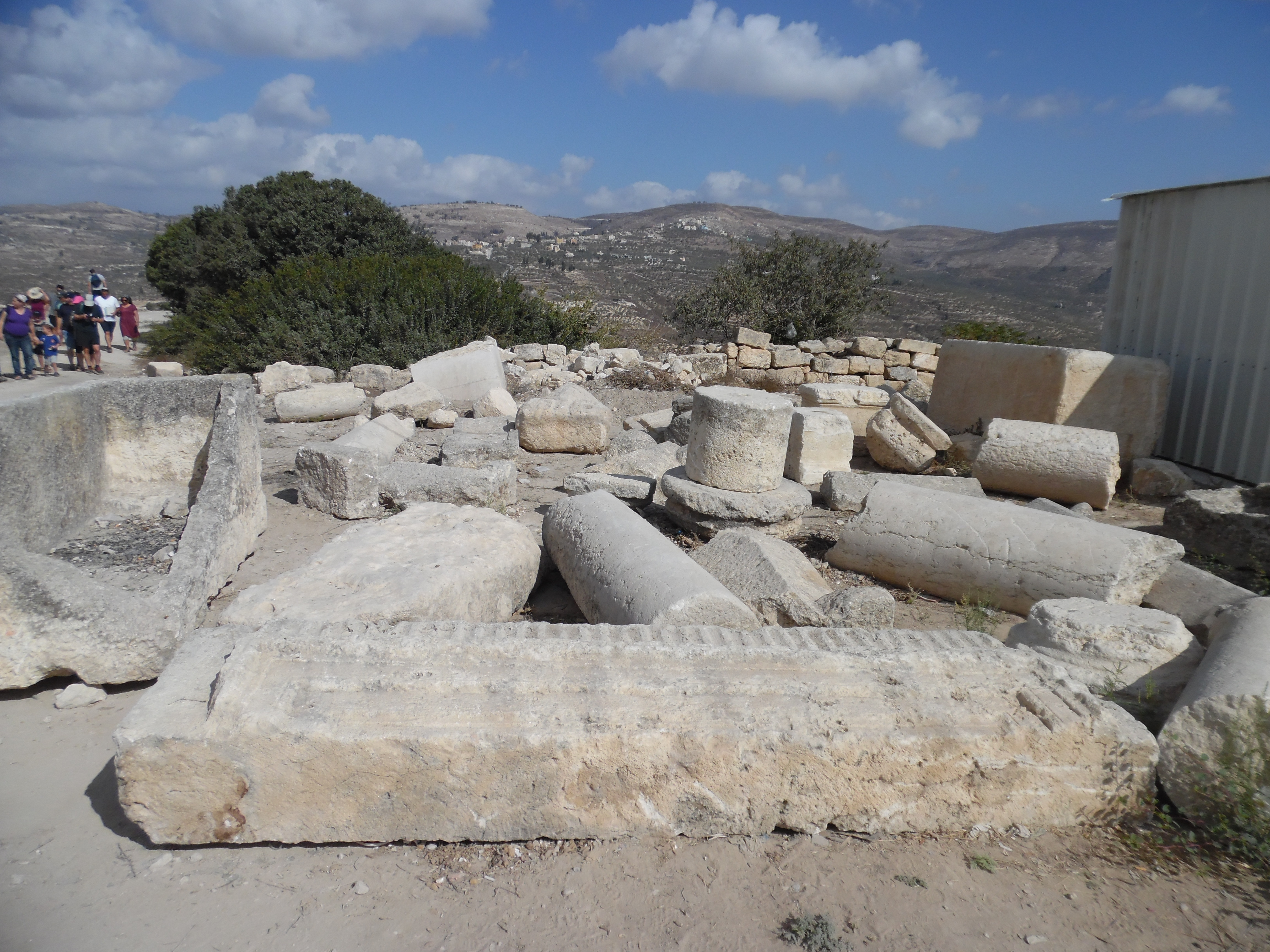 עיר קדומה בארץ ישראל. בירת ממלכת ישראל במאות ה-9 וה-8 לפנה"ס.